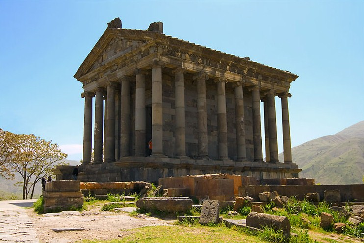 Языческий храм в Гарни (Армения) - памятник, относящийся к эпохе язычества и эллинизма. Как полагают, он был посвящён языческому богу Солнца Митре.